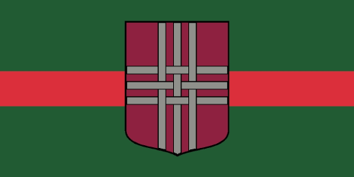 Laucienes pagasta karogs